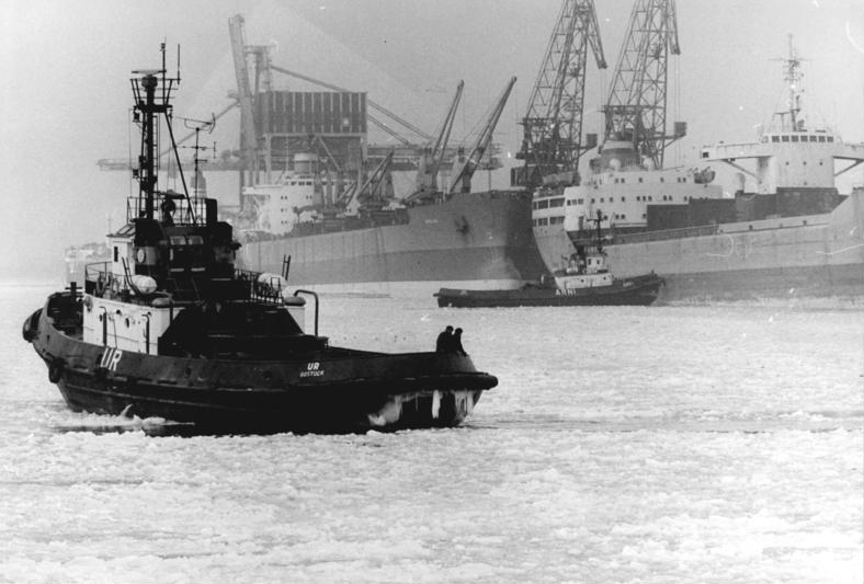 Rostock, Hafen, Schlepper, Eisbrecher, Winter ADN-ZB Sindermann 15.2.1985 Rostock: Reger Umschlagbetrieb herrscht trotz Eis und Frost an den kilometerlangen Kais des Überseehafens, wo in- und ausländische Schiffe festgemacht haben. Rund um die Uhr halten Schlepper die Fahrrinne frei von Festeis.